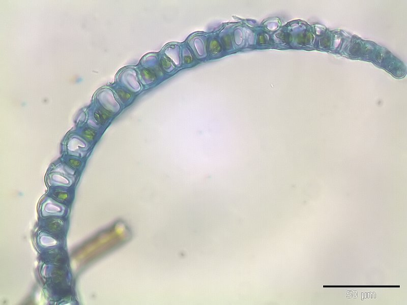 Sphagnum warnstorfii, Astblatt-Querschnitt, 400x